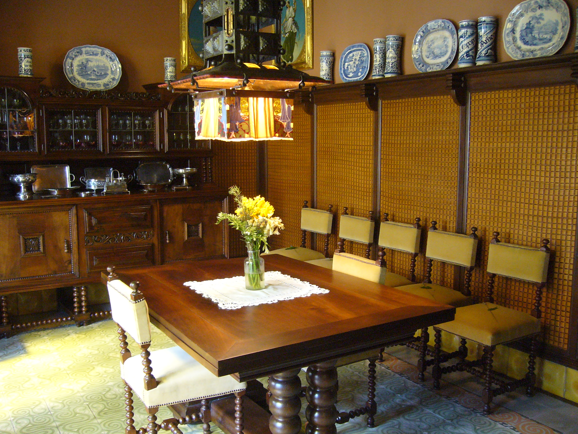 Menjador de la Casa Masó, Girona